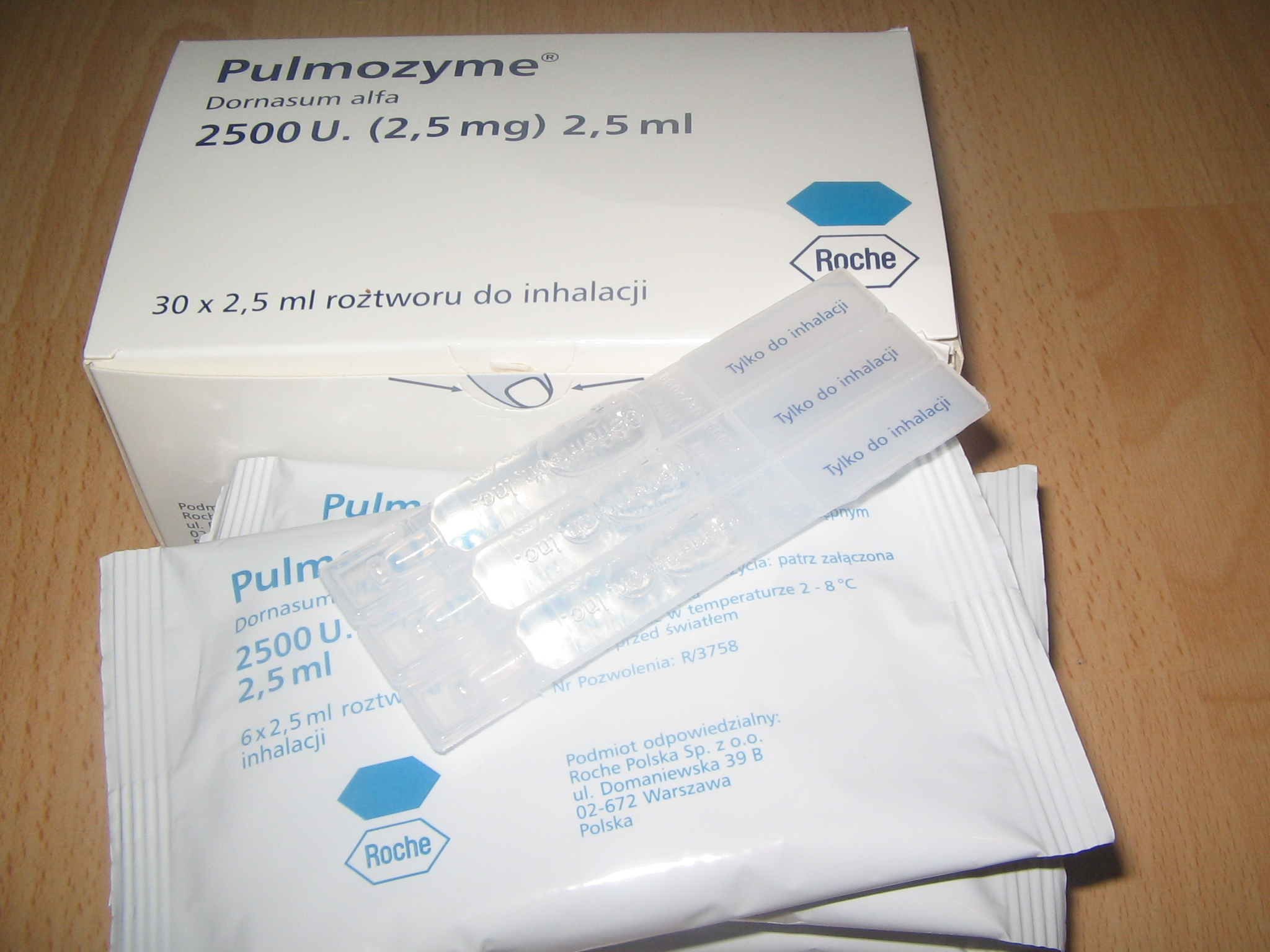 Opakowanie Pulmozyme